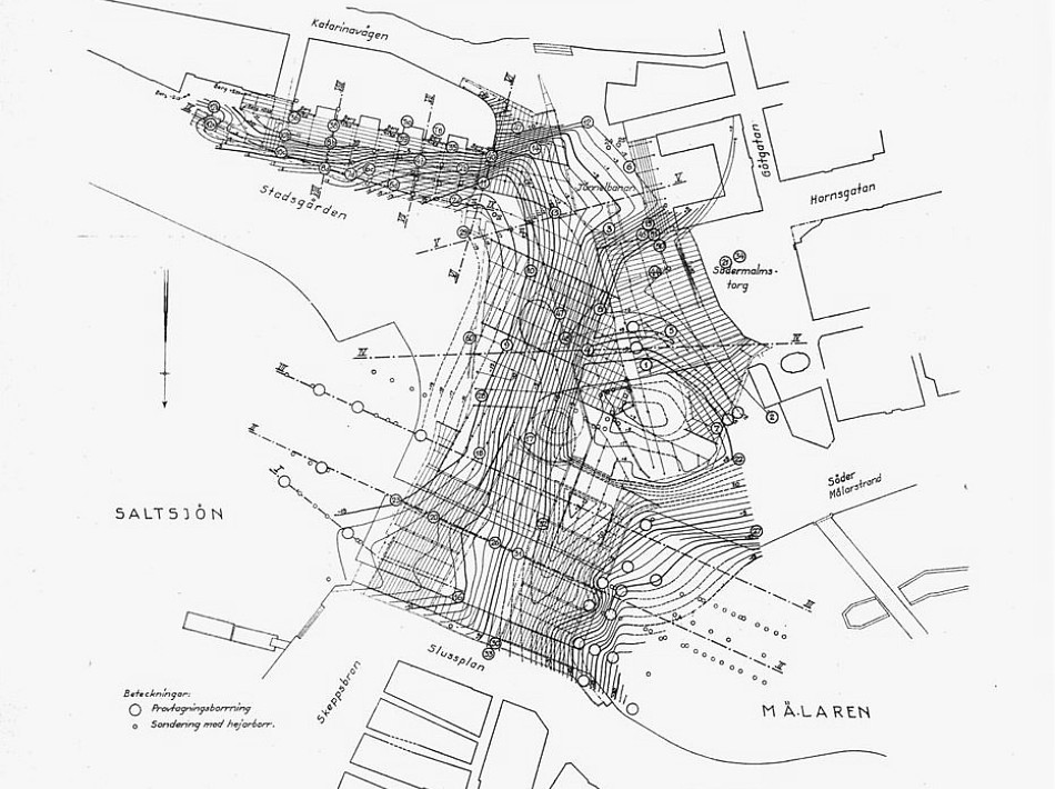 Grundläggning vid Slussen i Stockholm medelst pålning enligt system Franki. Nivåplan över grusåsen (norr är nedåt).